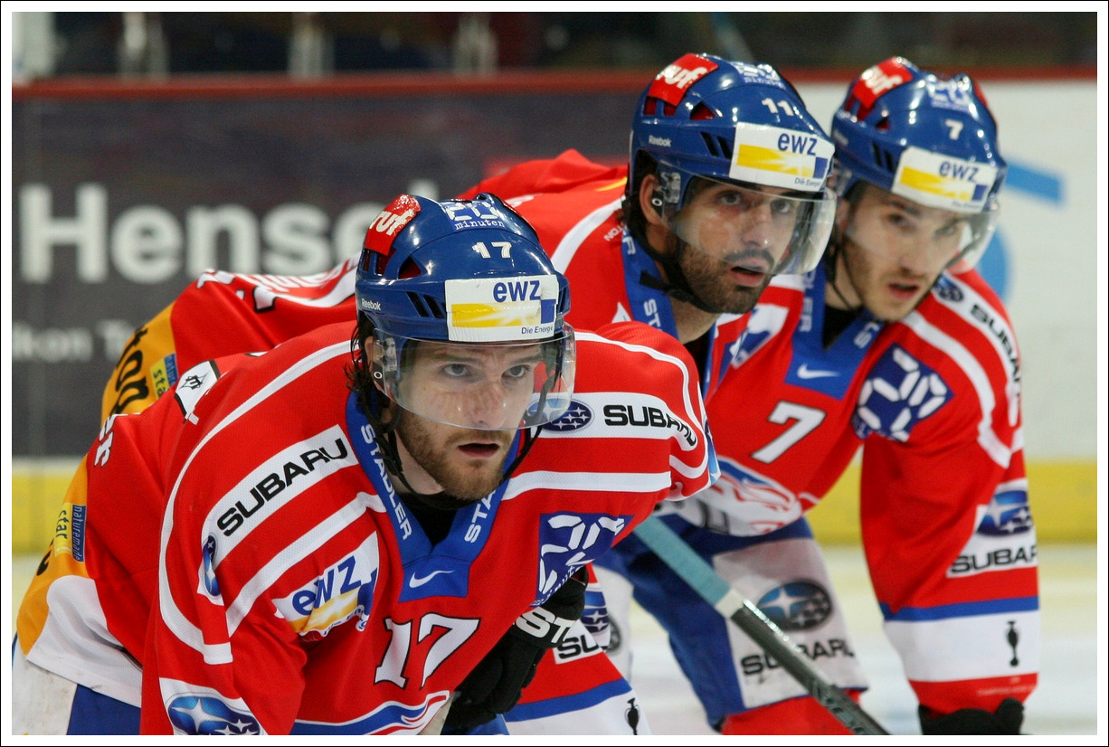 De gauche à droite: Lukas Grauwiler, Andri Stoffel et Thibaut Monnet